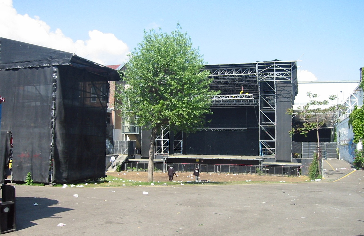 Arena, Wien. Open-Air-Gelände